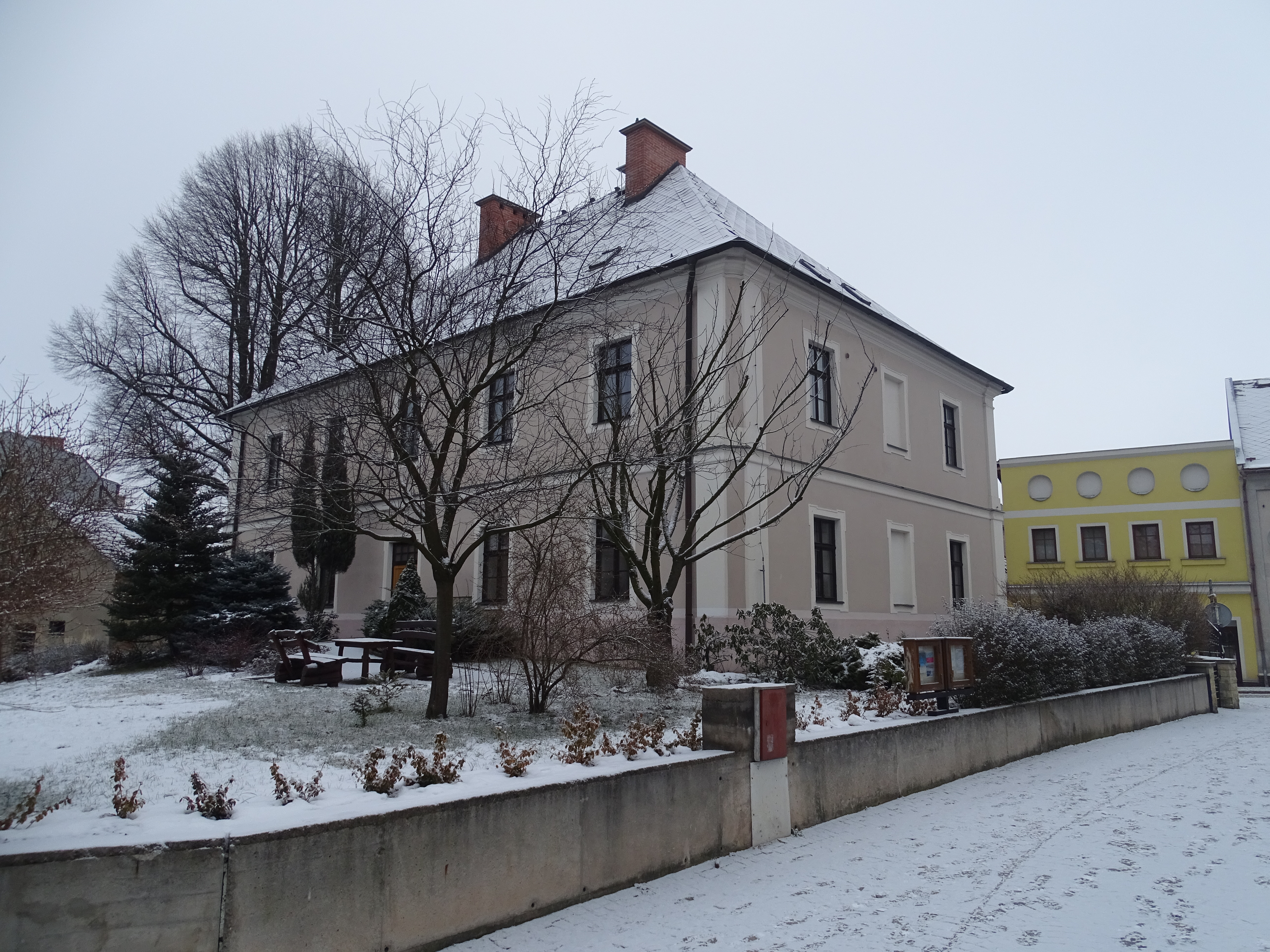 budova farního úřadu